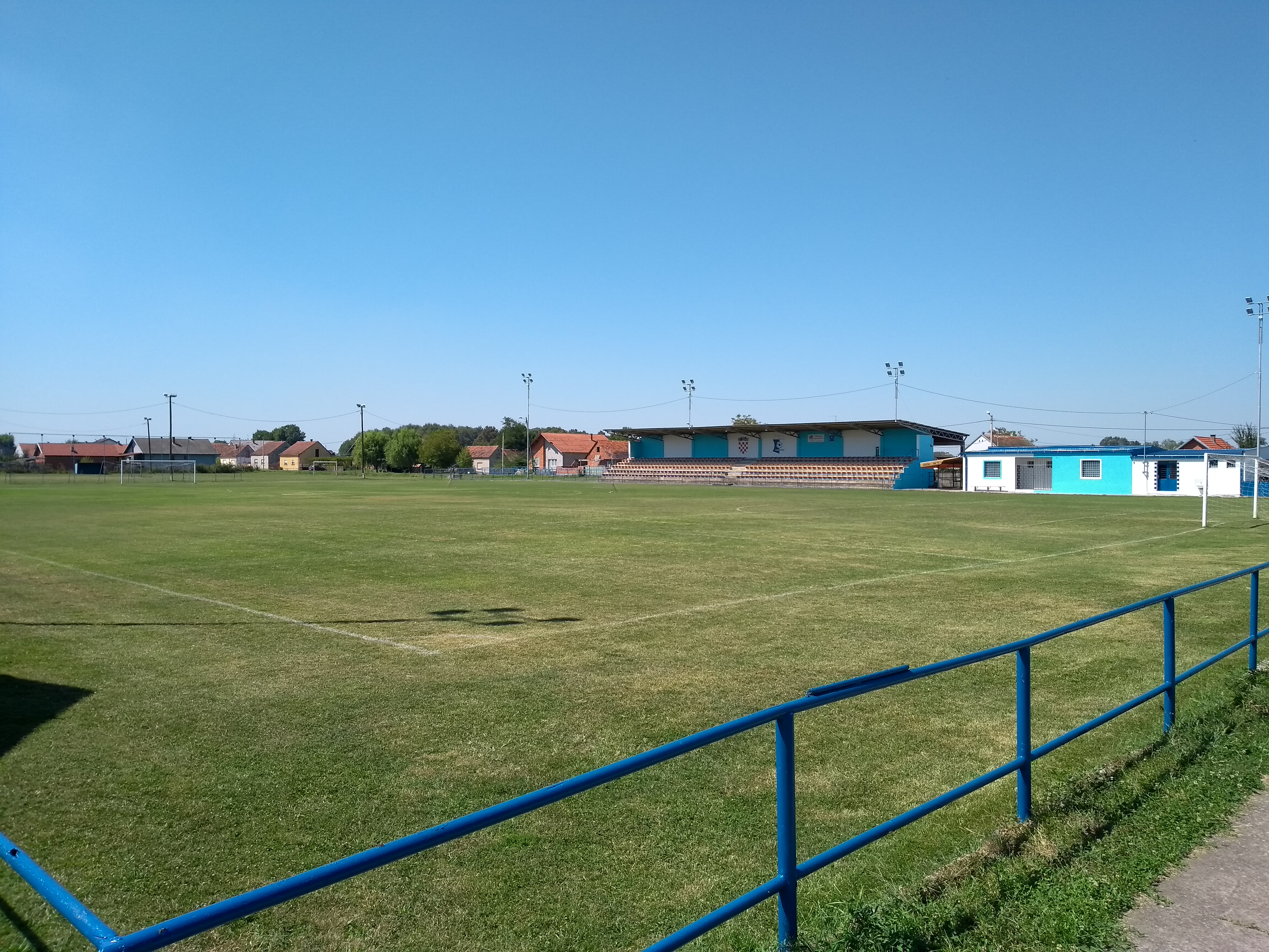 Igralište NK Slavonija Budrovci